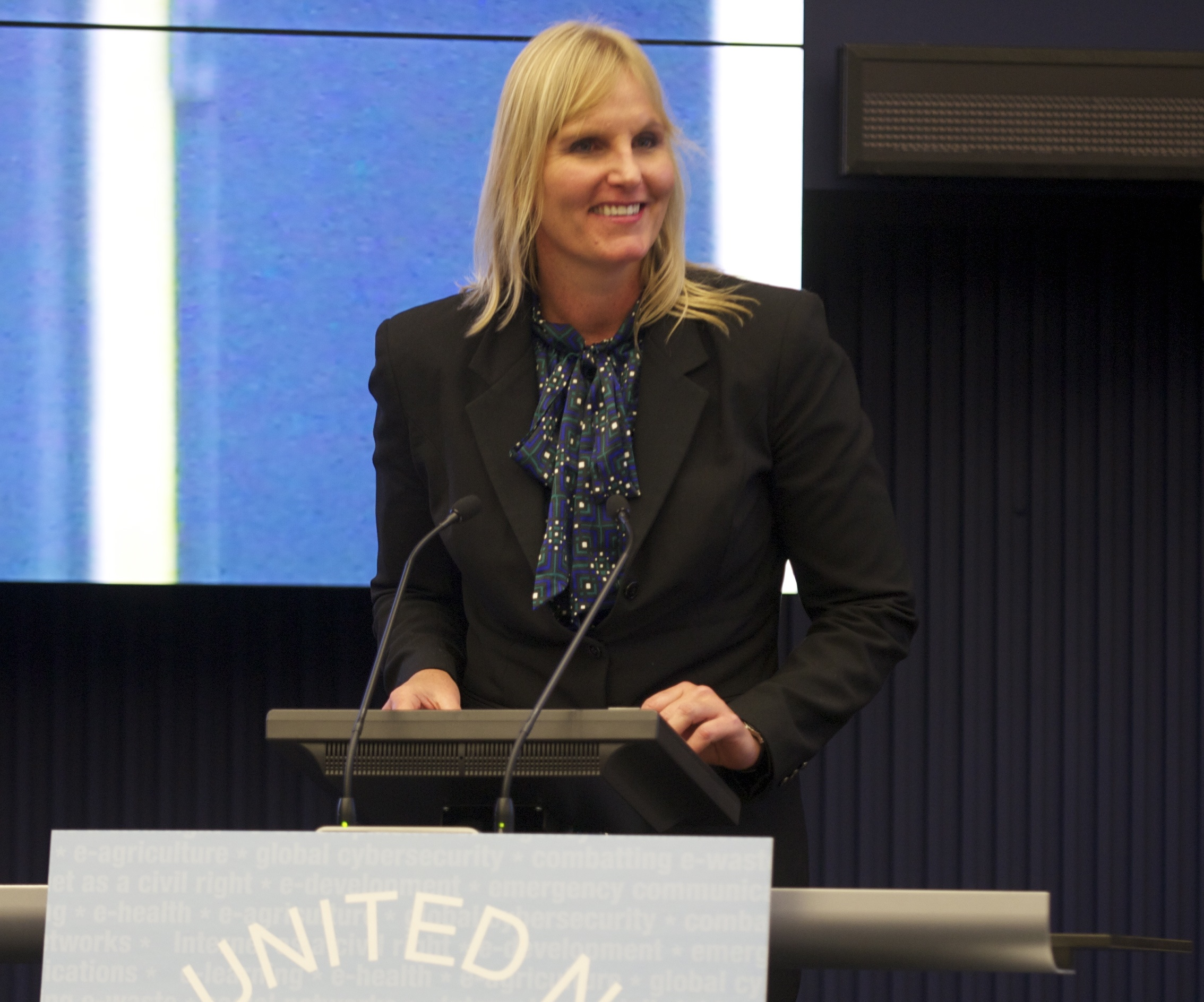 La ex nadadora costarricense y embajadora Sylvia Poll, primera ganadora de una medalla olímpica para Costa Rica (plata, 100 m espalda Seúl 1988), durante una conferencia de FerMUN.